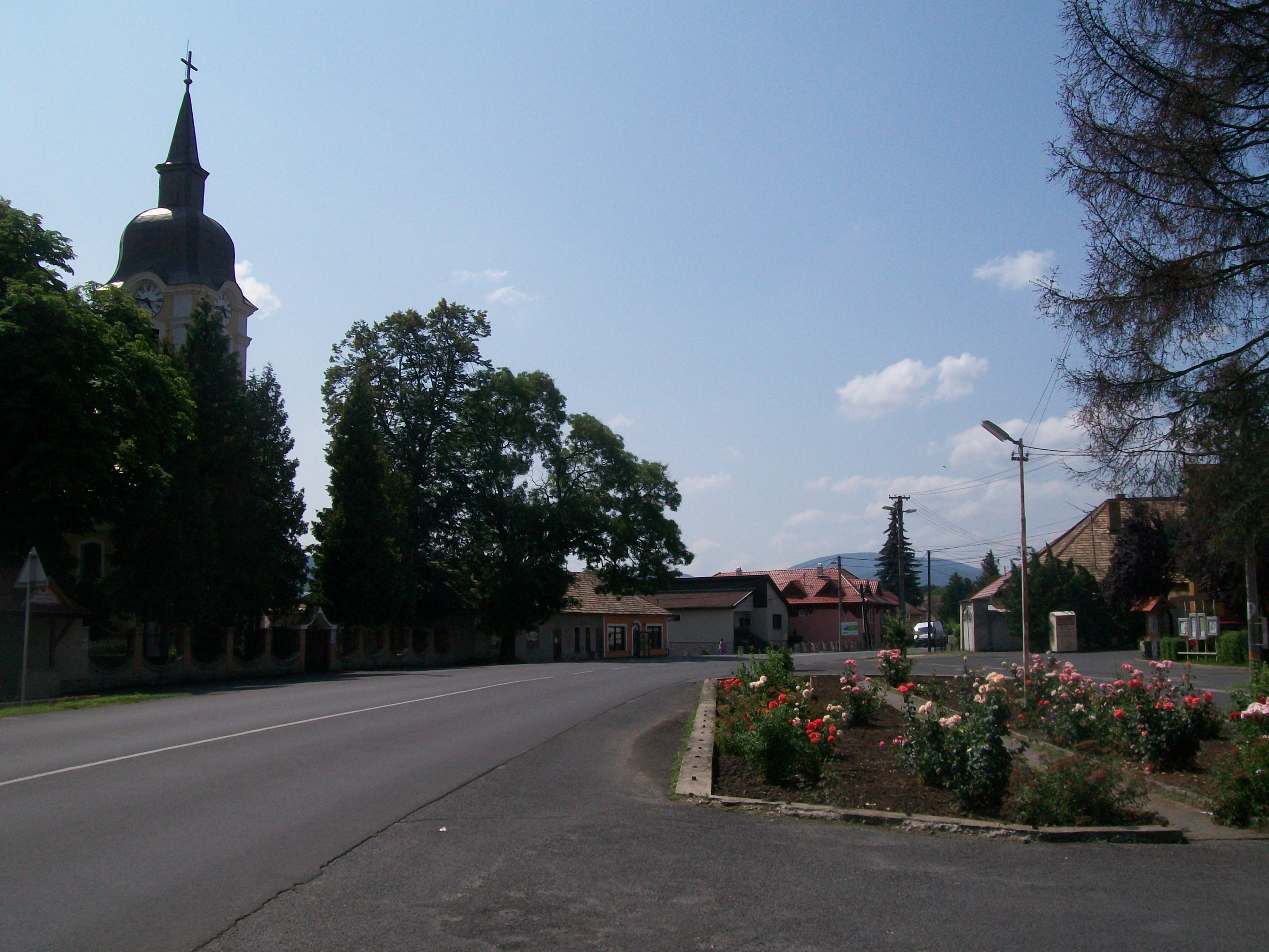 Zákutie obce Biskupice